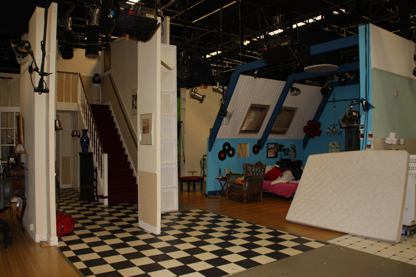 De studio van 'Kinderen geen bezwaar'. Links het trappenhuis (op de begane grond van het huis) en rechts de slaapkamers en badkamer (eerste verdieping).